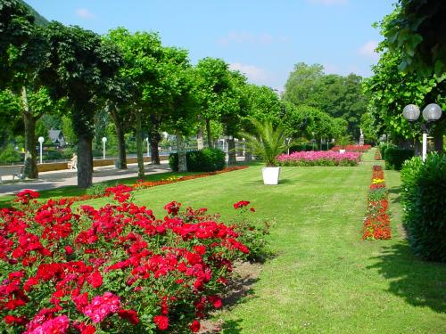 Bad Ems, Kurpark